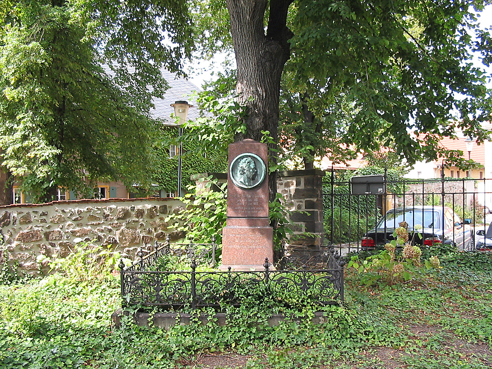 Grabmal für Richard Steche auf dem alten Kirchhof in Kötzschenbroda; Porträtmedaillon 1894 von Bildhauer Heinrich Epler (Dresden)